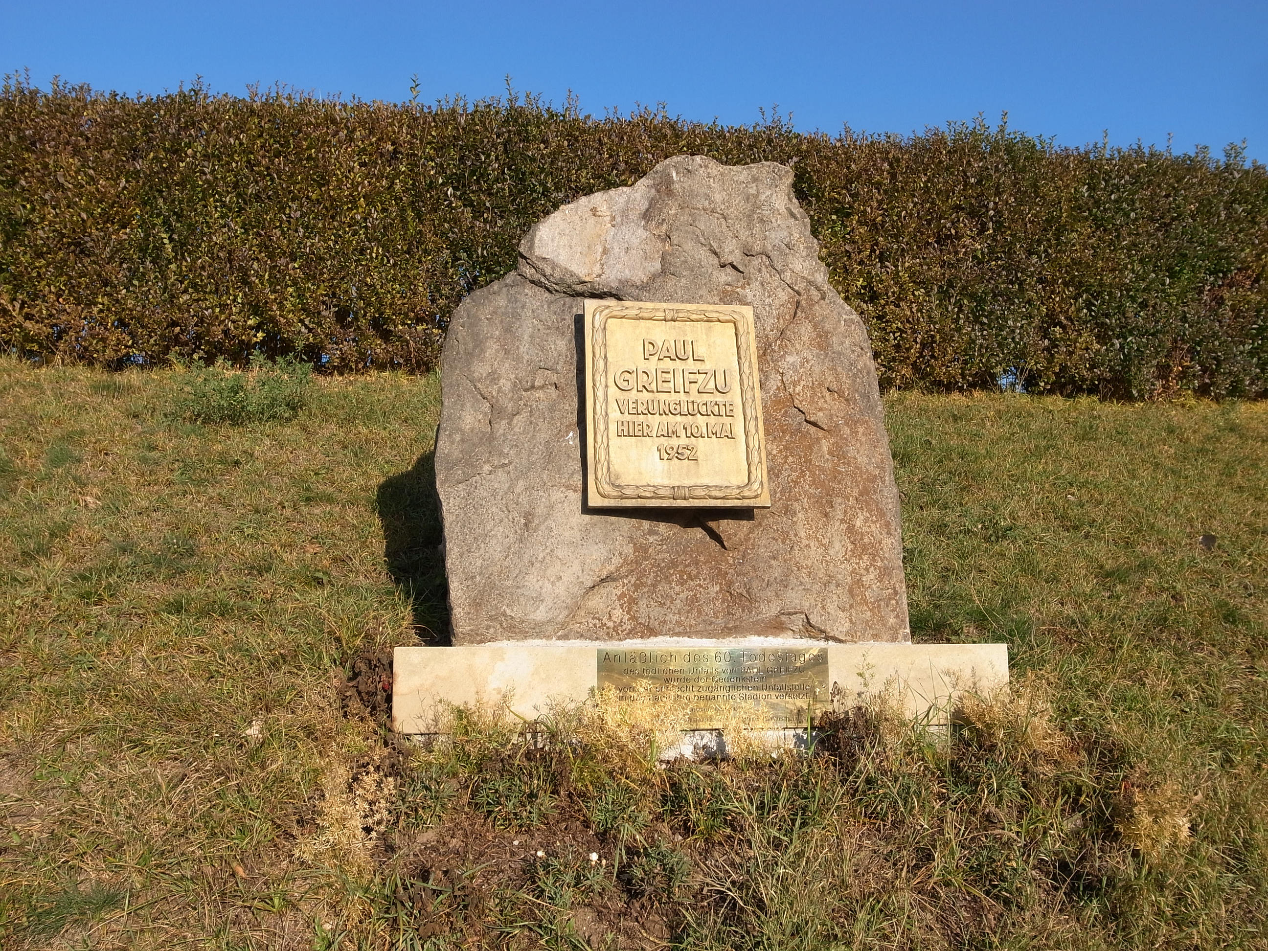 Paul-Greifzu-Gedenkstein, 2012 in das Paul-Greifzu-Stadion nach Dessau versetzt